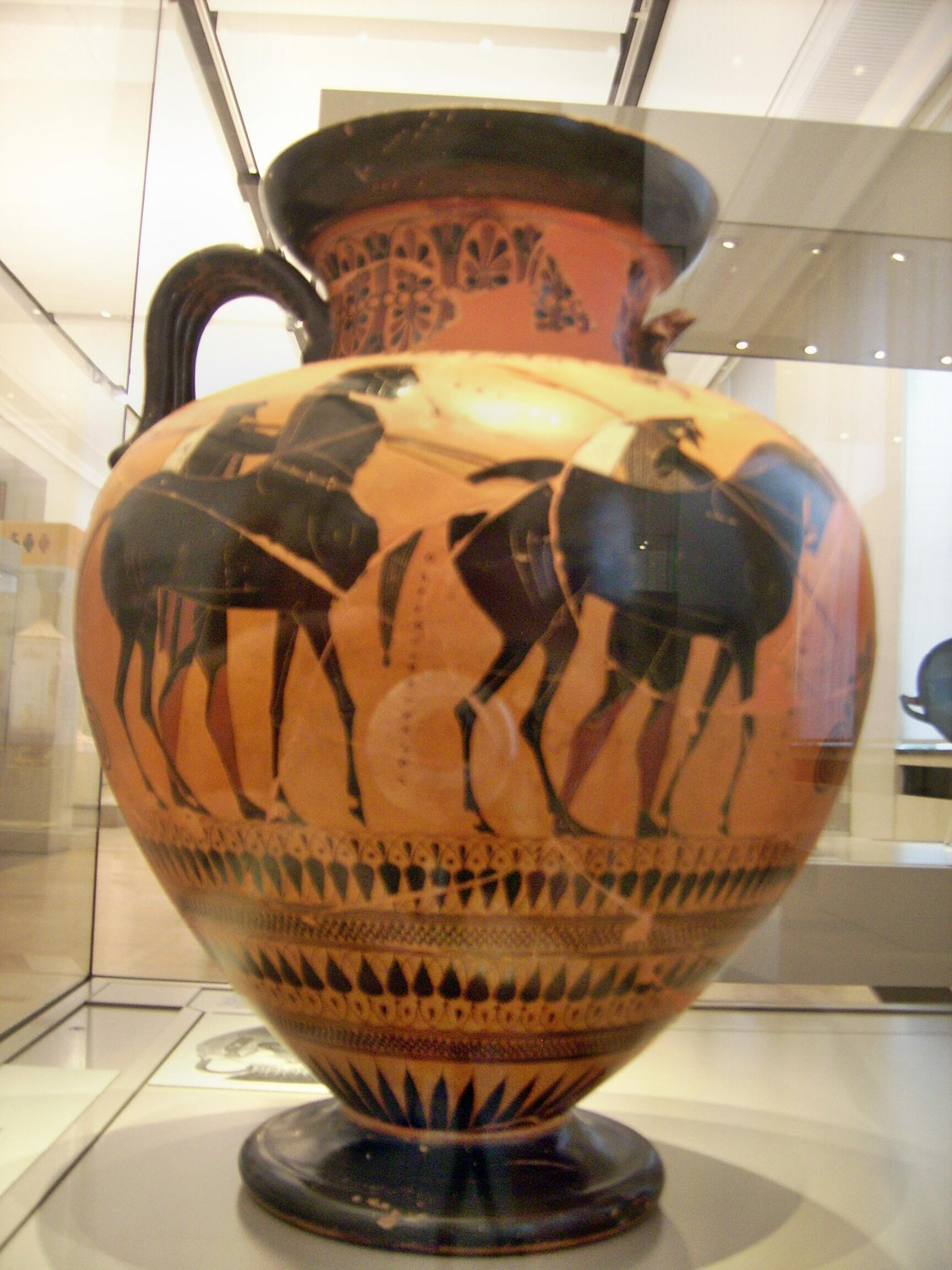 Akamas und Demophon mit ihren Pferden, attische Halsamphora, als Töpfer und Maler von Exekias signiert, um 540 v. Chr., Antikensammlung Berlin/Altes Museum (F 1720)